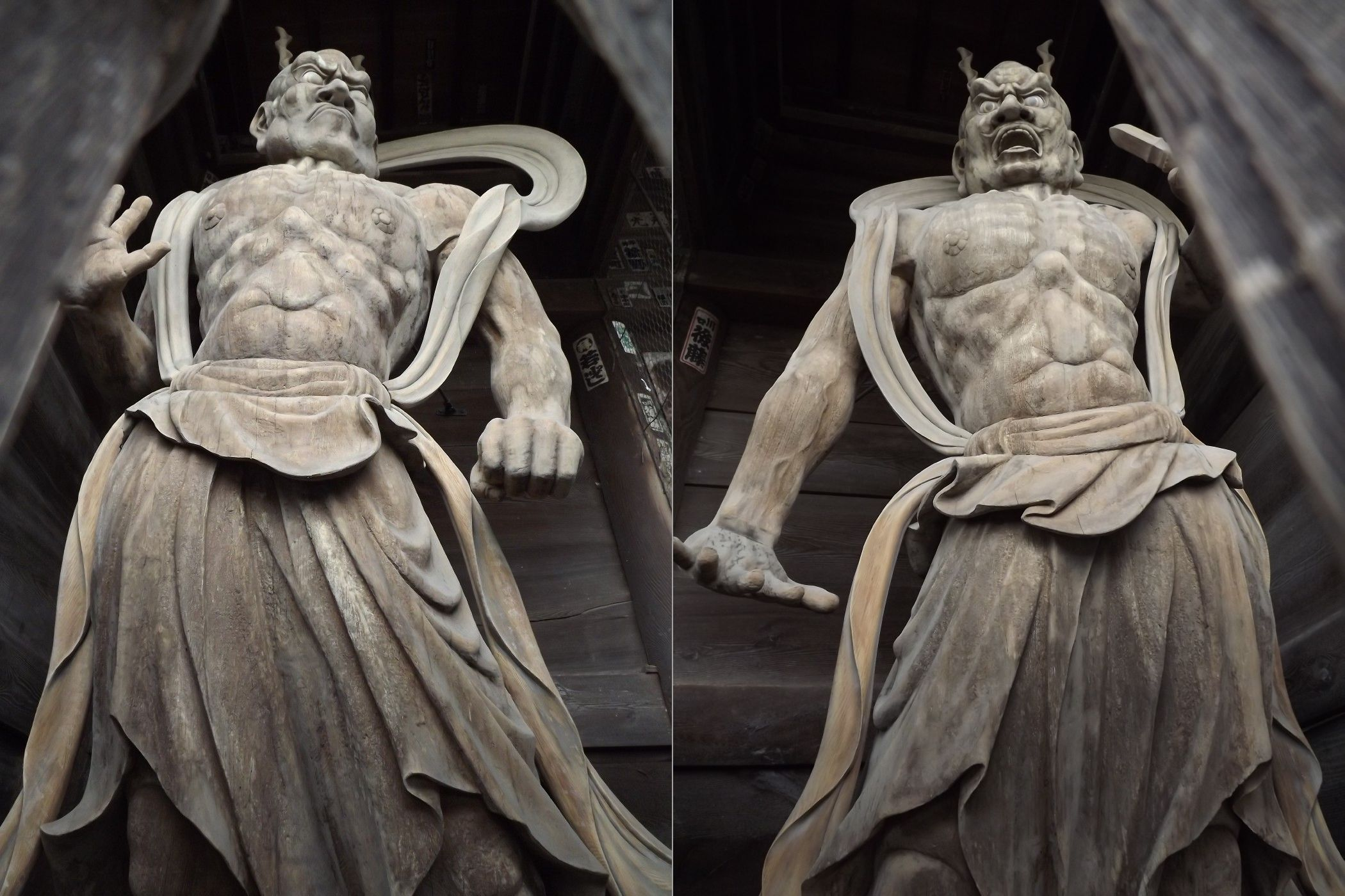 浄土寺の仁王像